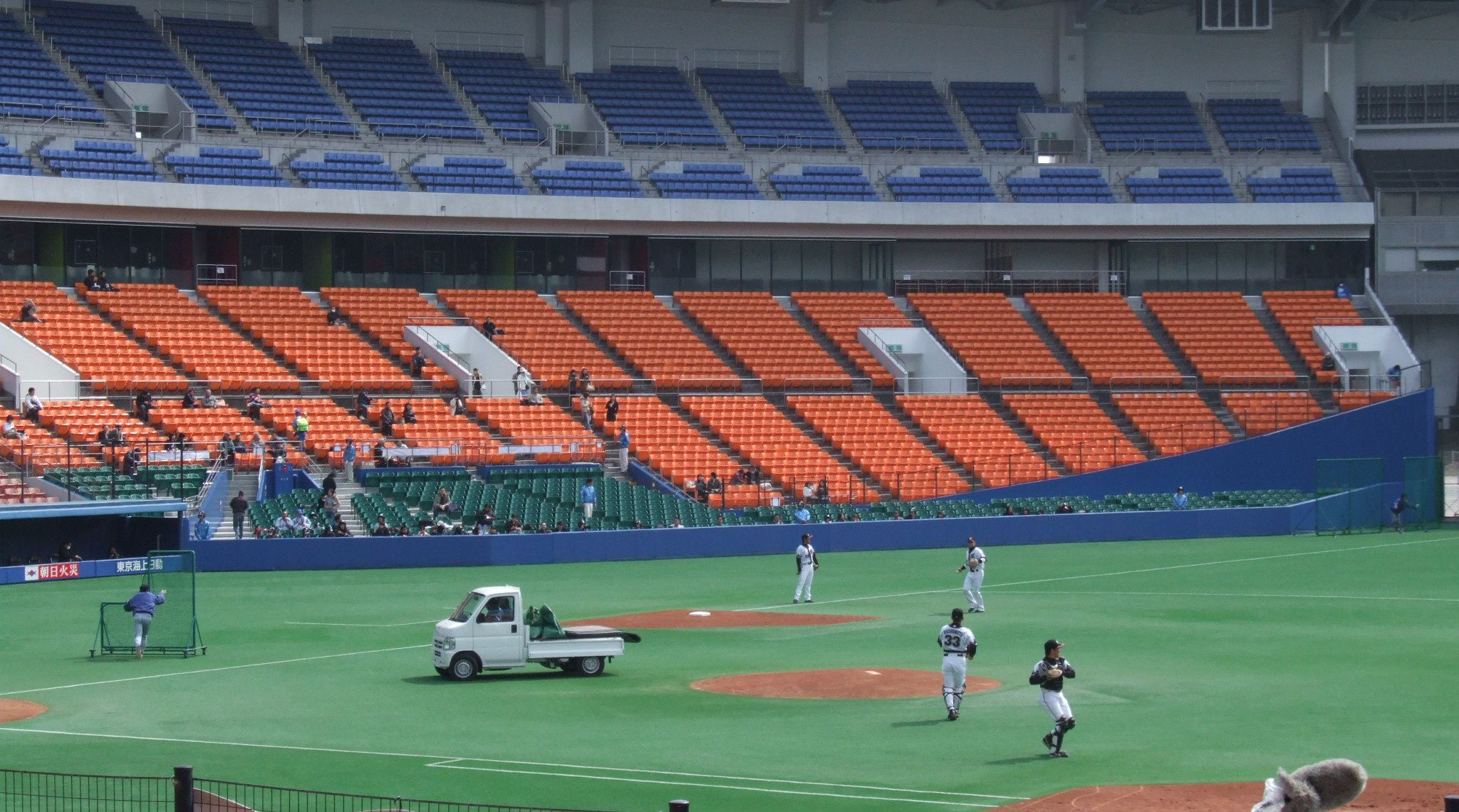 利用者:ROGによる撮影（2006年3月9日撮影） 2006年9月9日 (土) 17:50 . . ROG . . 2048×1140 (413 キロバイト)